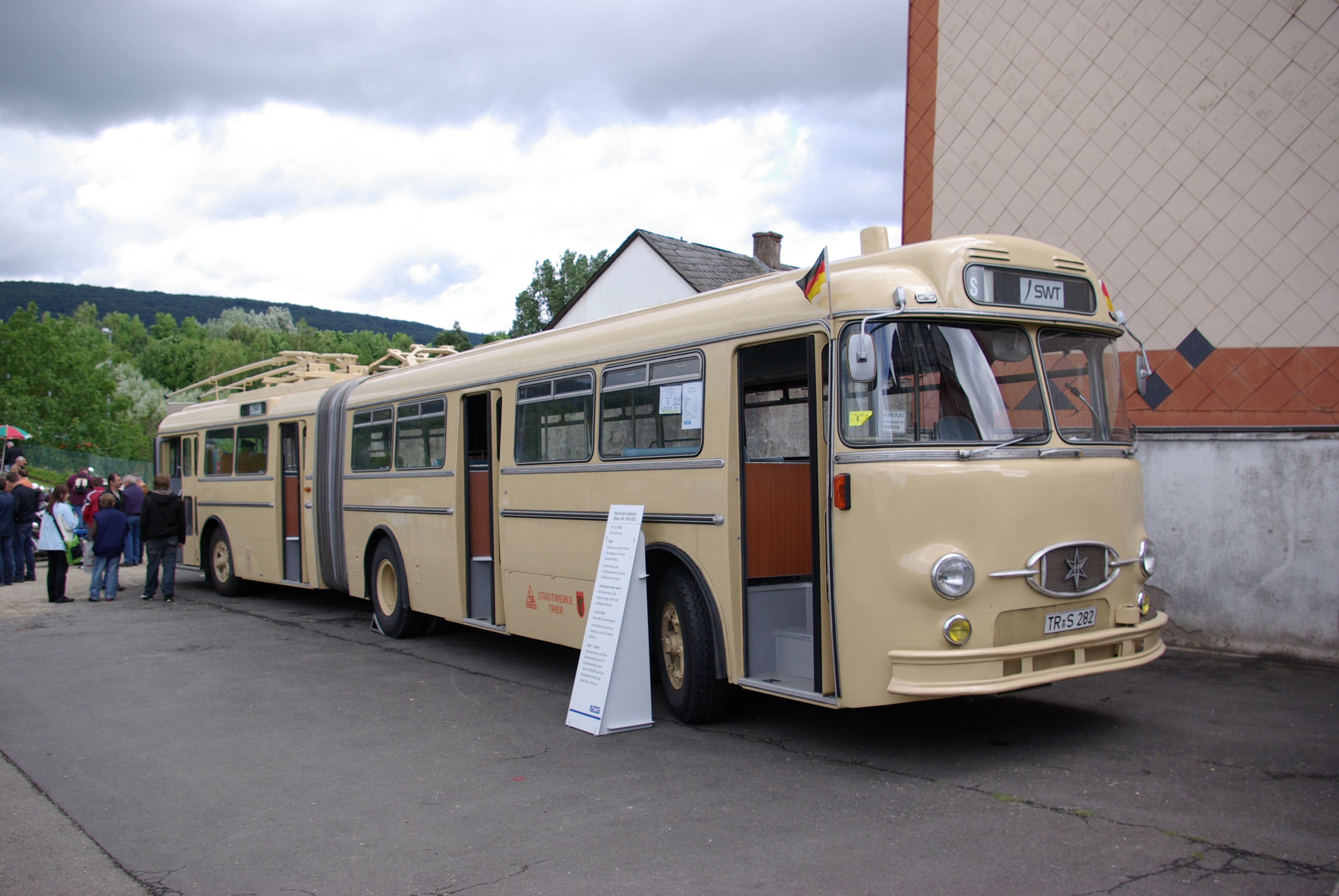 Henschel Obus HS 160 OSL, Baujahr 1962, 1969 Umbau auf Diesel, 2007-2008 restauriert. aufgenommen bei / photographed at "25. Internationales Konzer Oldtimer-Treffen", 19. Juli 2009